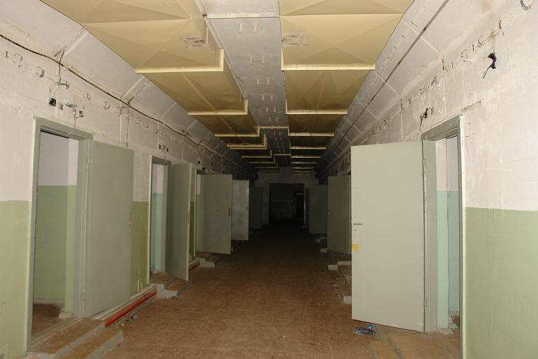 Bunker Falkenhagen, Level 4 - Rocket fuel / sarin facilities